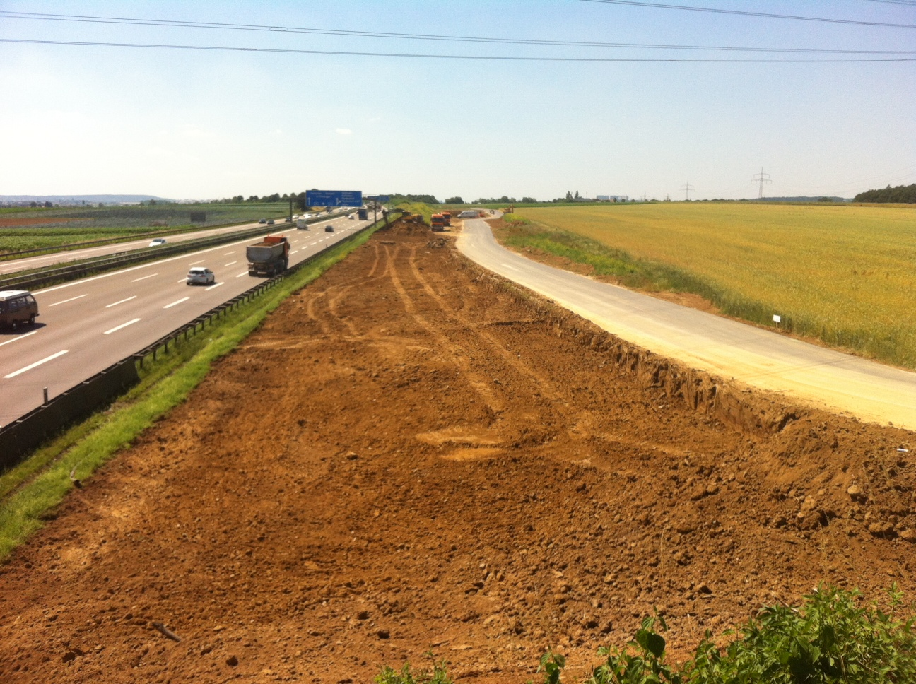 Baufeldfreimachung für den Tunnel Denkendorf parallel zur Bundesautobahn 8. Der Tunnel entsteht im Rahmen des Bahnprojekts Stuttgart 21. Er liegt auf der Markung der Gemeinde Denkendorf (Landkreis Esslingen) und trägt daher ihren Namen.